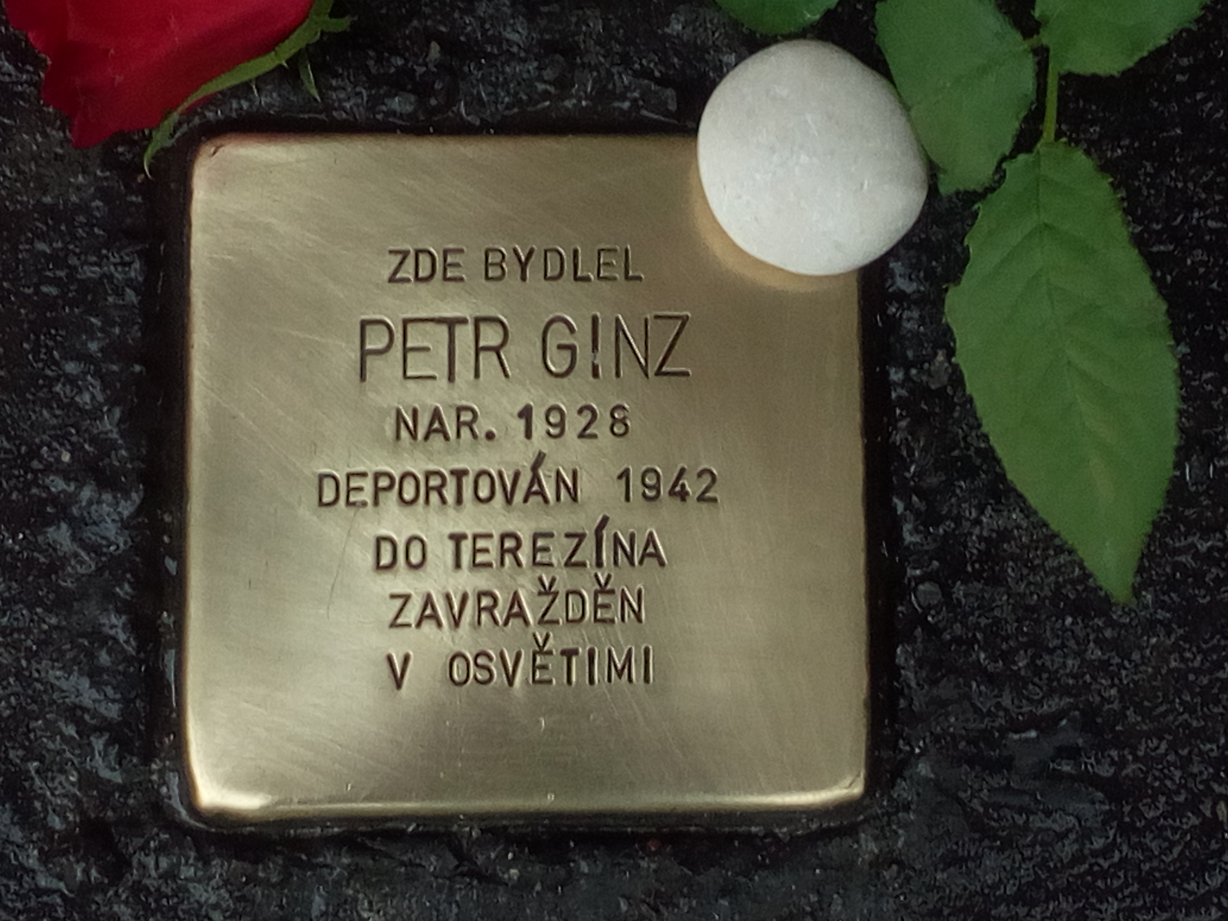 Kámen zmizelých věnovaný Petru Ginzovi. Nachází se ve Stárkově ulici v Praze.